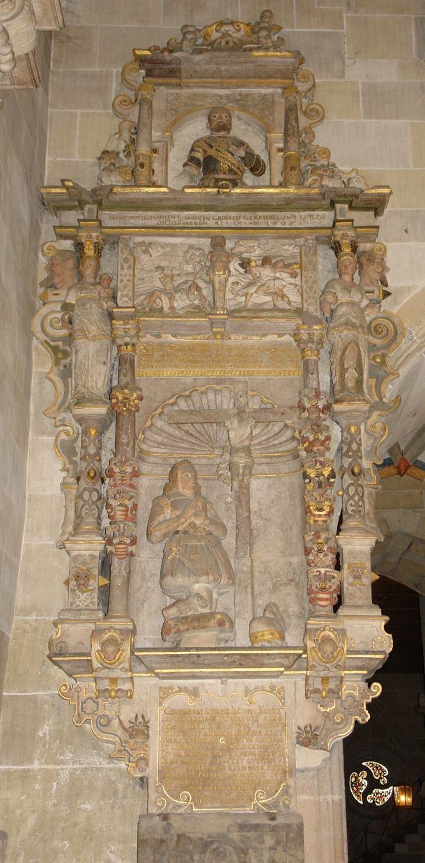 Grab- und Gedächtnismal des Jakob Kotze (1590-1606) in der Stiftskirche Tübingen